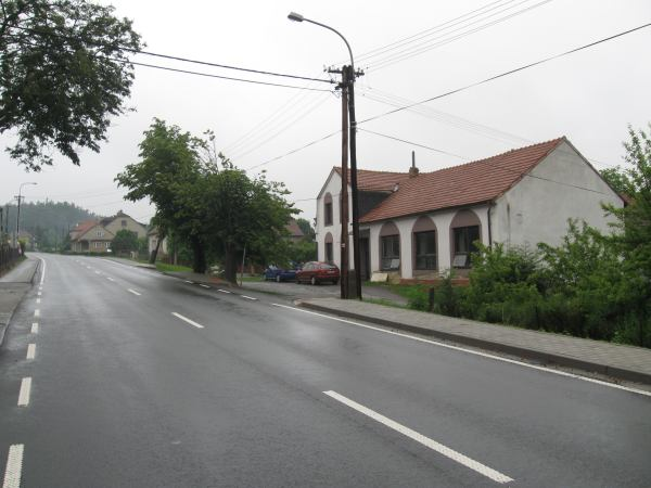 Valchov